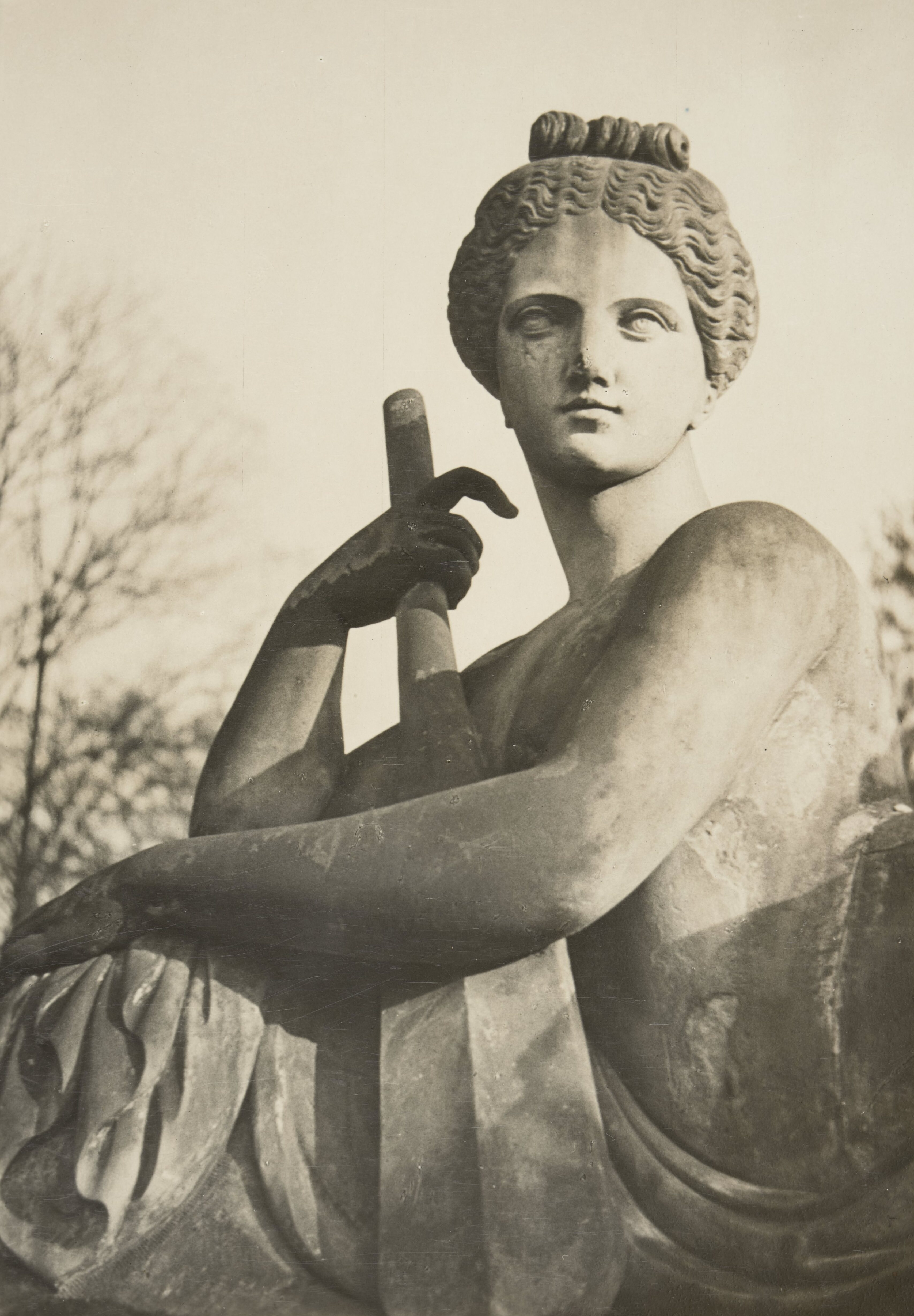 Alegoria Wisły, rzeźba Ludwika Kauffmanna, pocztówka z 1938 r., fot. Roman Puchalski